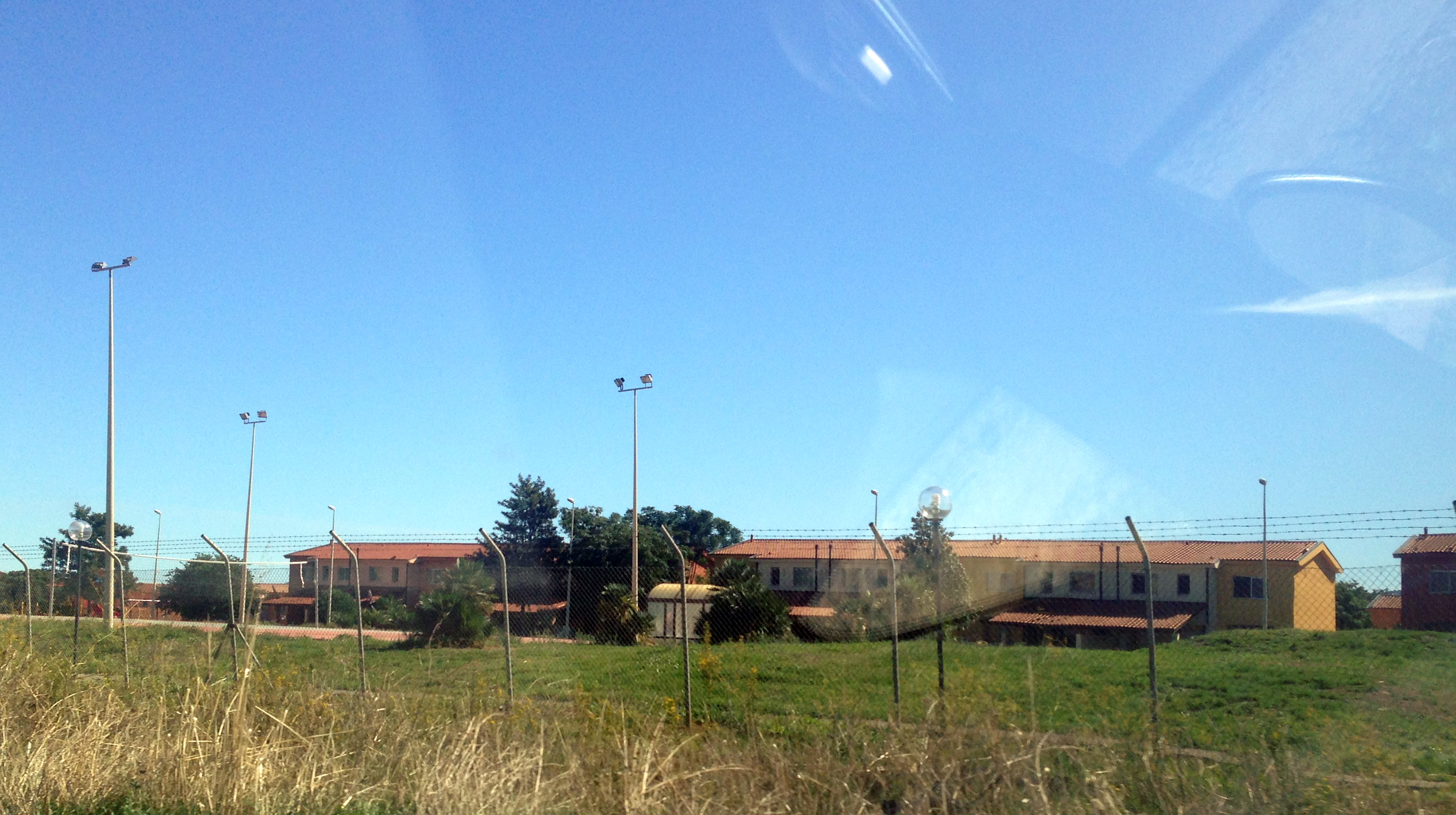 CARA di Mineo